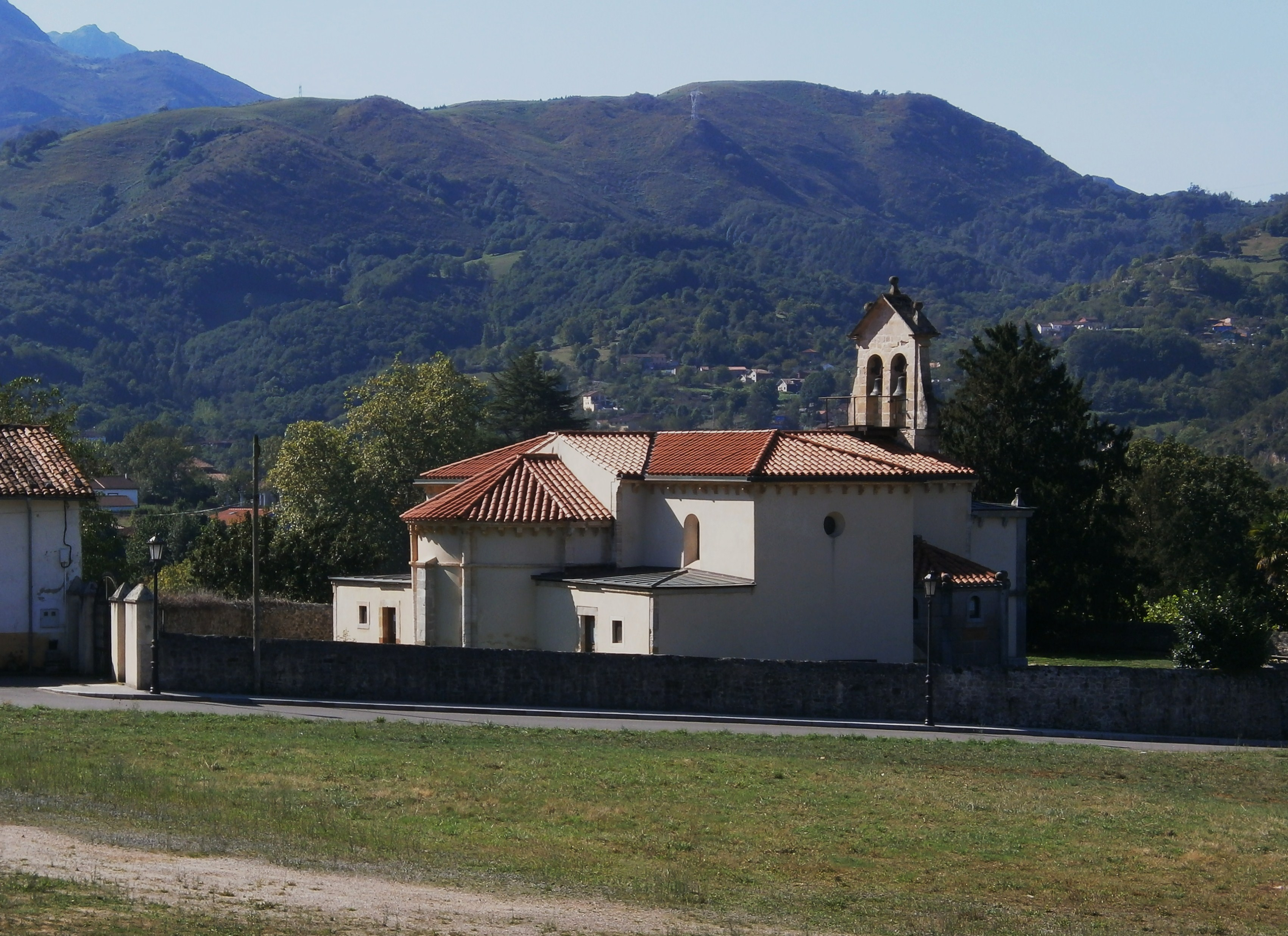 Iglesia de San Juan de Priorio. Vista general.